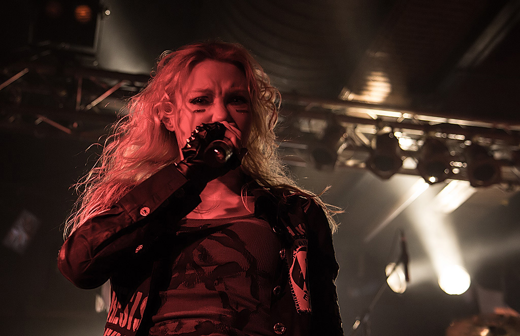 Arch Enemy 17.10.2012 Rockfabrik, Ludwigsburg